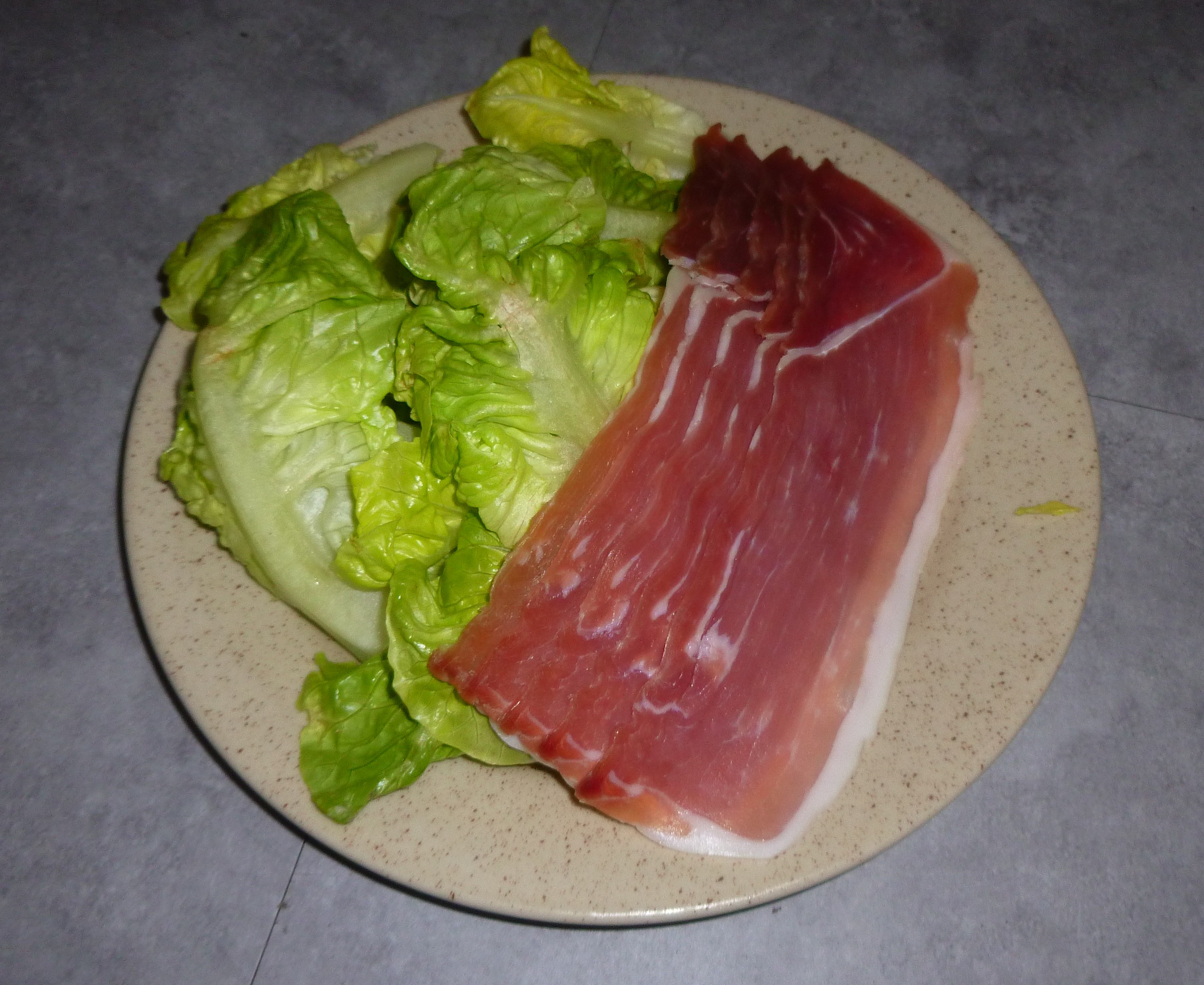 Recette santé rapide à faire et parfaite en pique-nique: salade verte crue + jambon crue